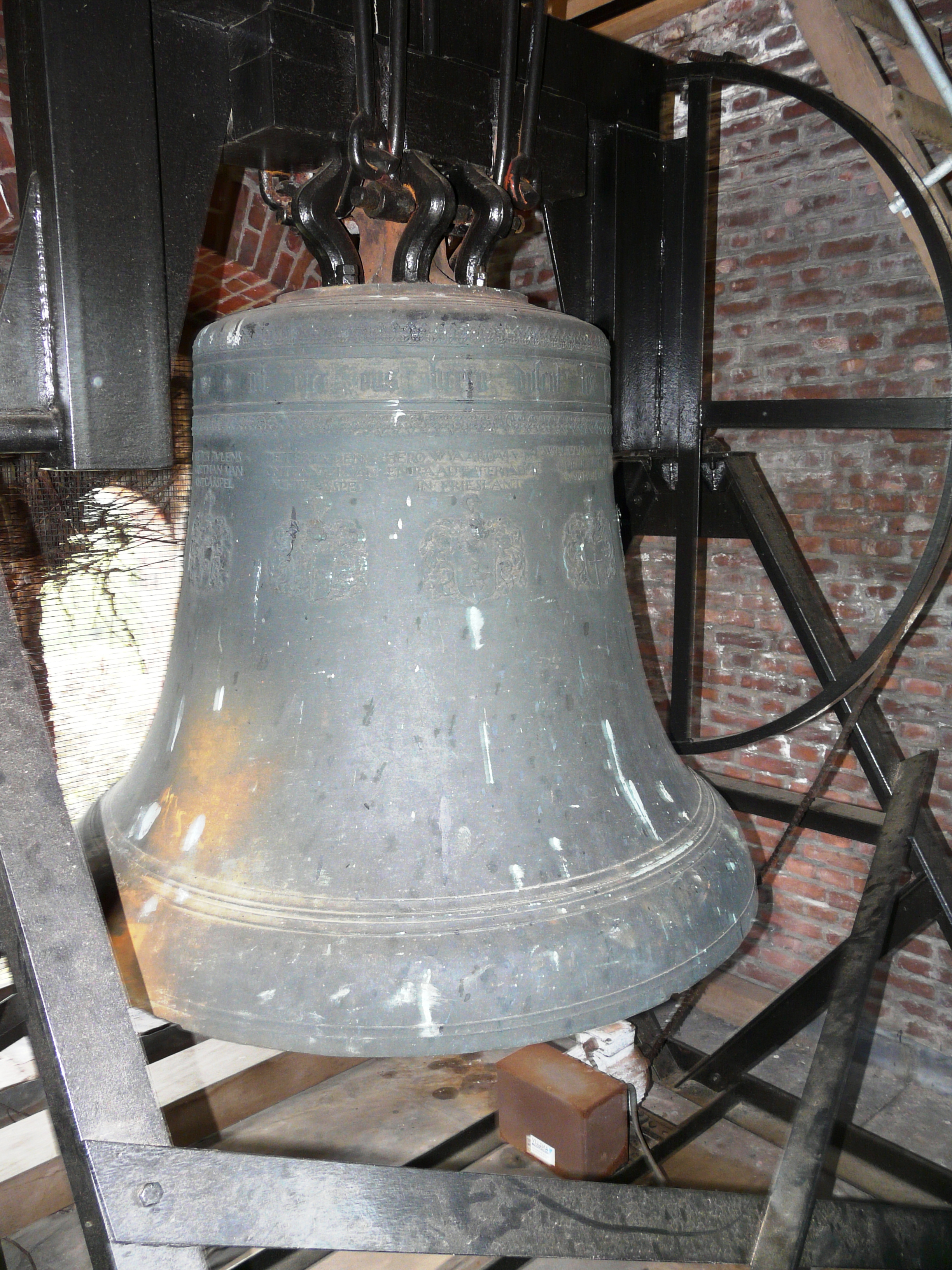 Surhuzum: tsjerkeklok